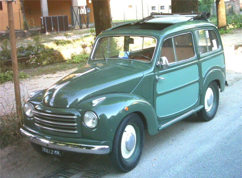 Fiat 500 C Belvedere del 1954 fotografato a Medole nel 2007